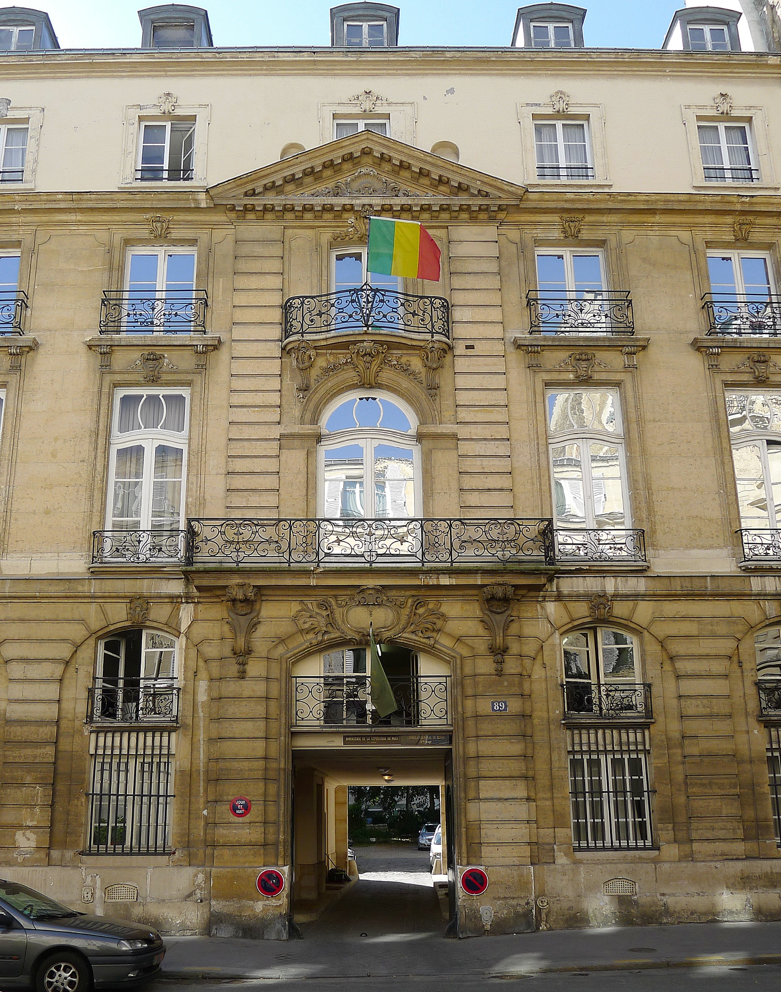 Rue du Cherche-Midi (n°89 : hôtel de Montmonrency-Bours) - Paris VI Actuellement (2012) siège de l'ambassade de la République du Mali .